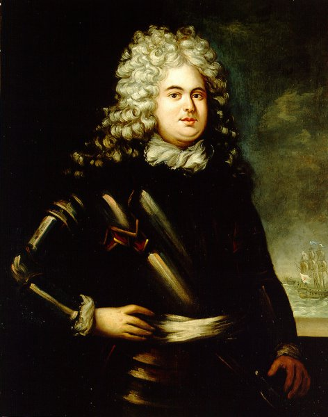 Retrato de Esteban de Mary, marqués de Mary y teniente general de la Real Armada Española. Este retrato es una copia anónima de 1848 de un original del siglo XVIII.